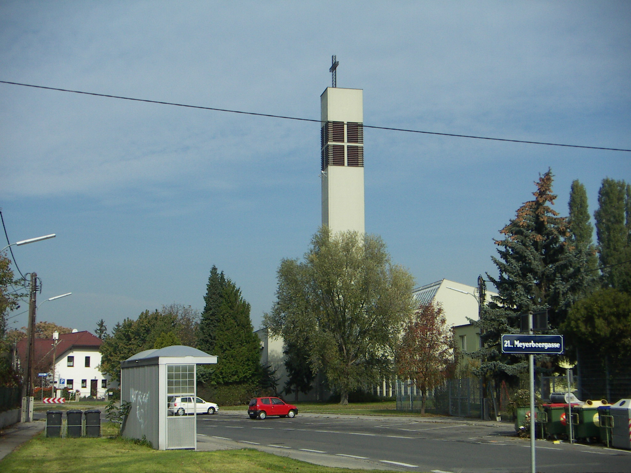 Pfarrkirche Schwarzlackenau, St.-Antonius-von-Padua-Kirche, in Wien, Bezirk Floridsdorf, Ortsteil Jedlesee, Siedlung Schwarzlackenau. Architekt: Leo Splett